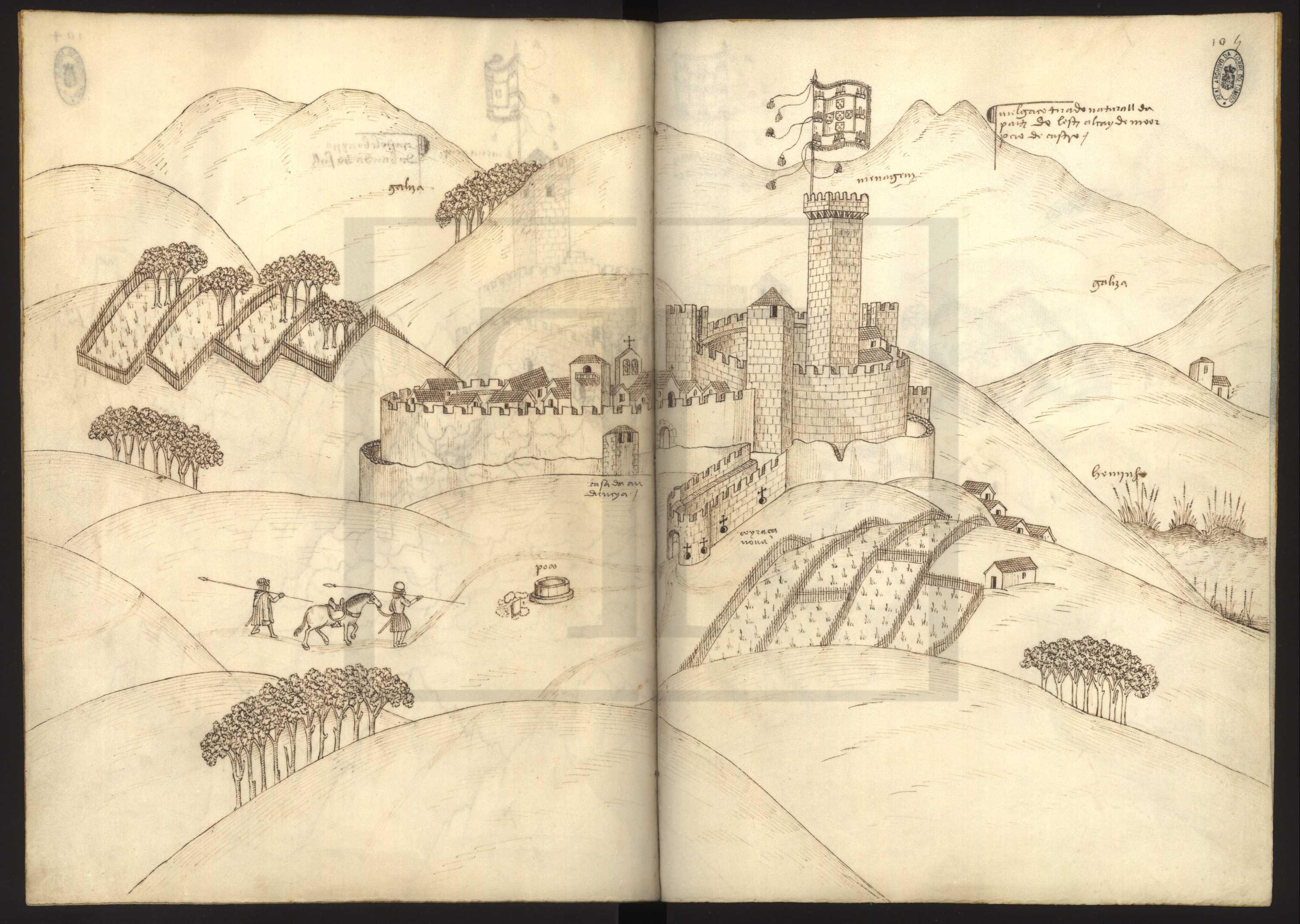 Livro das Fortalezas 105 - Melgaço